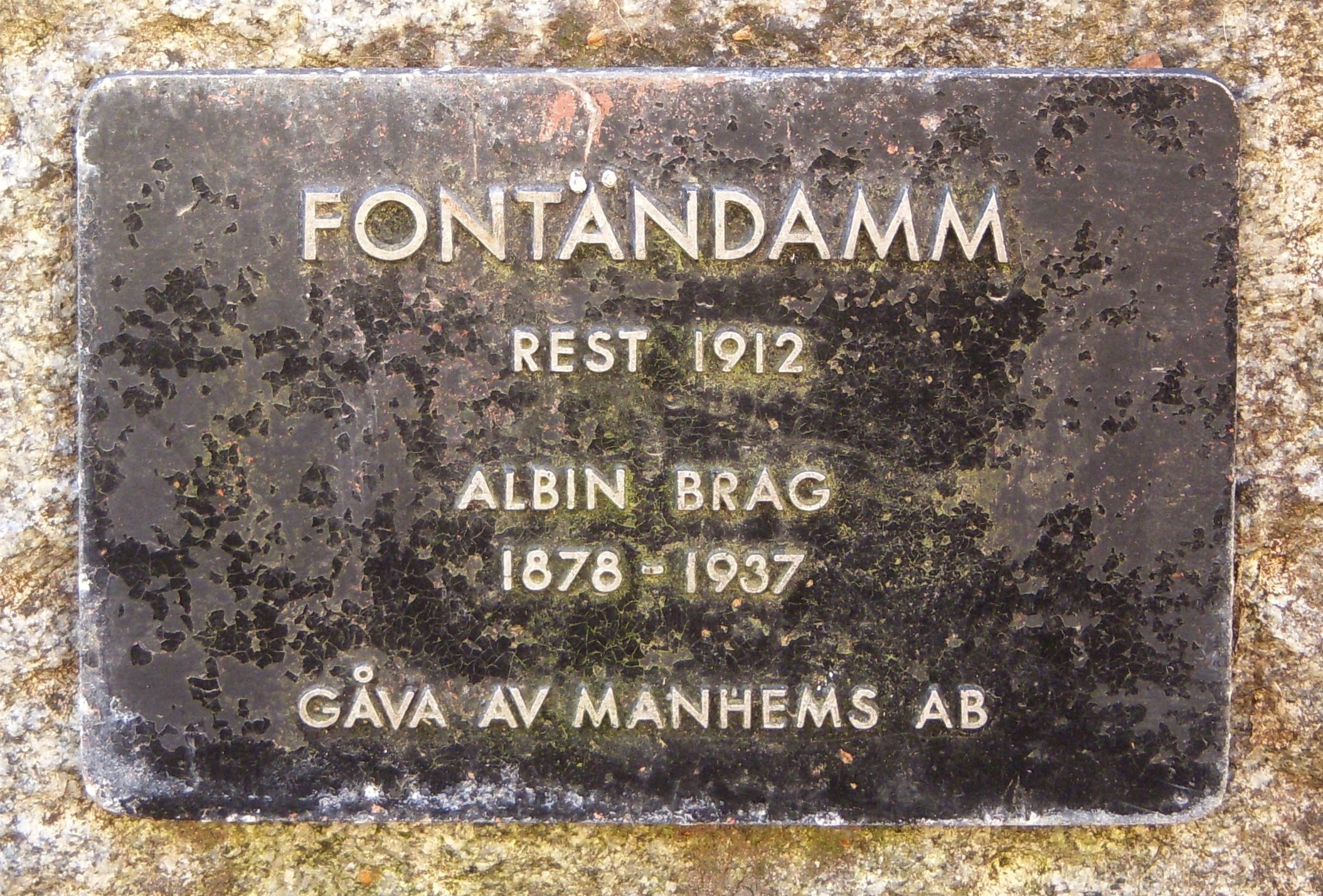 Fontändammen i Aspudden skapades 1912 av arkitekt Albin Brag och bekostades av byggnadsfirman Manhem.